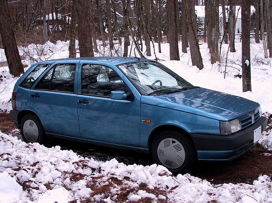 フィアット・ティーポ1.6DGT フロントビュー2004年3月24日 自身で撮影